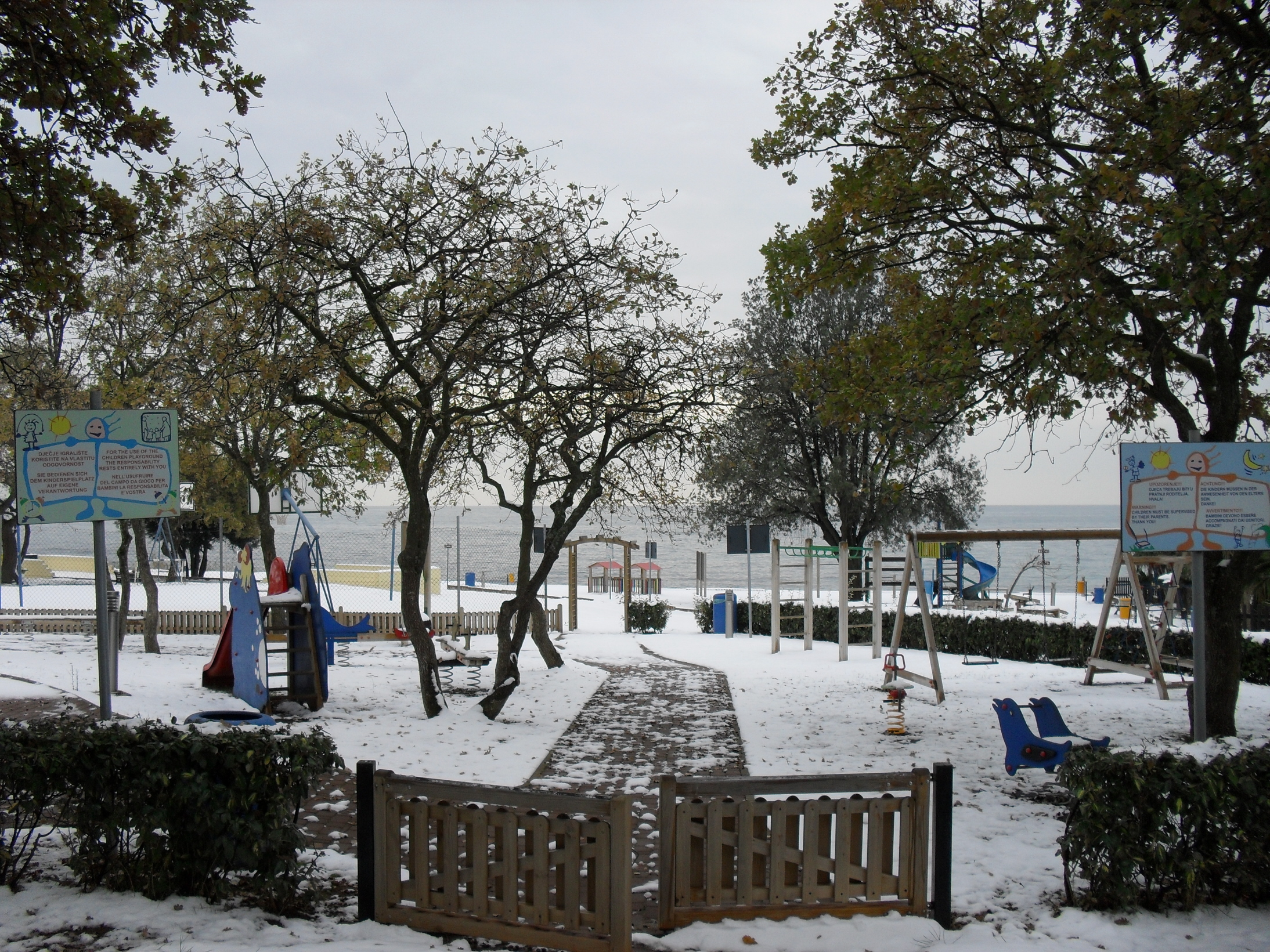 ulika 21 12 09 sneeuw/Schnee/snow